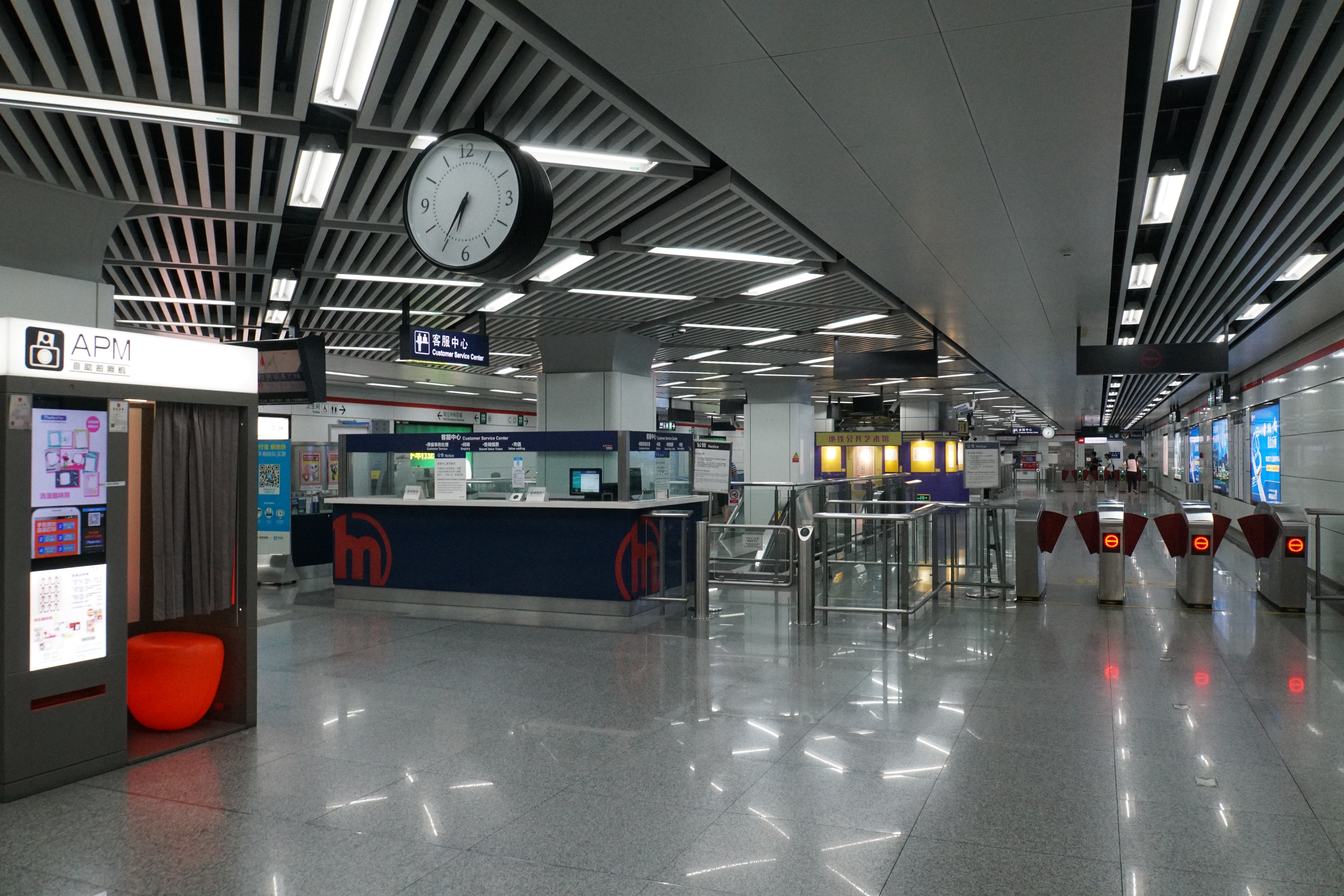 滨和路站站厅